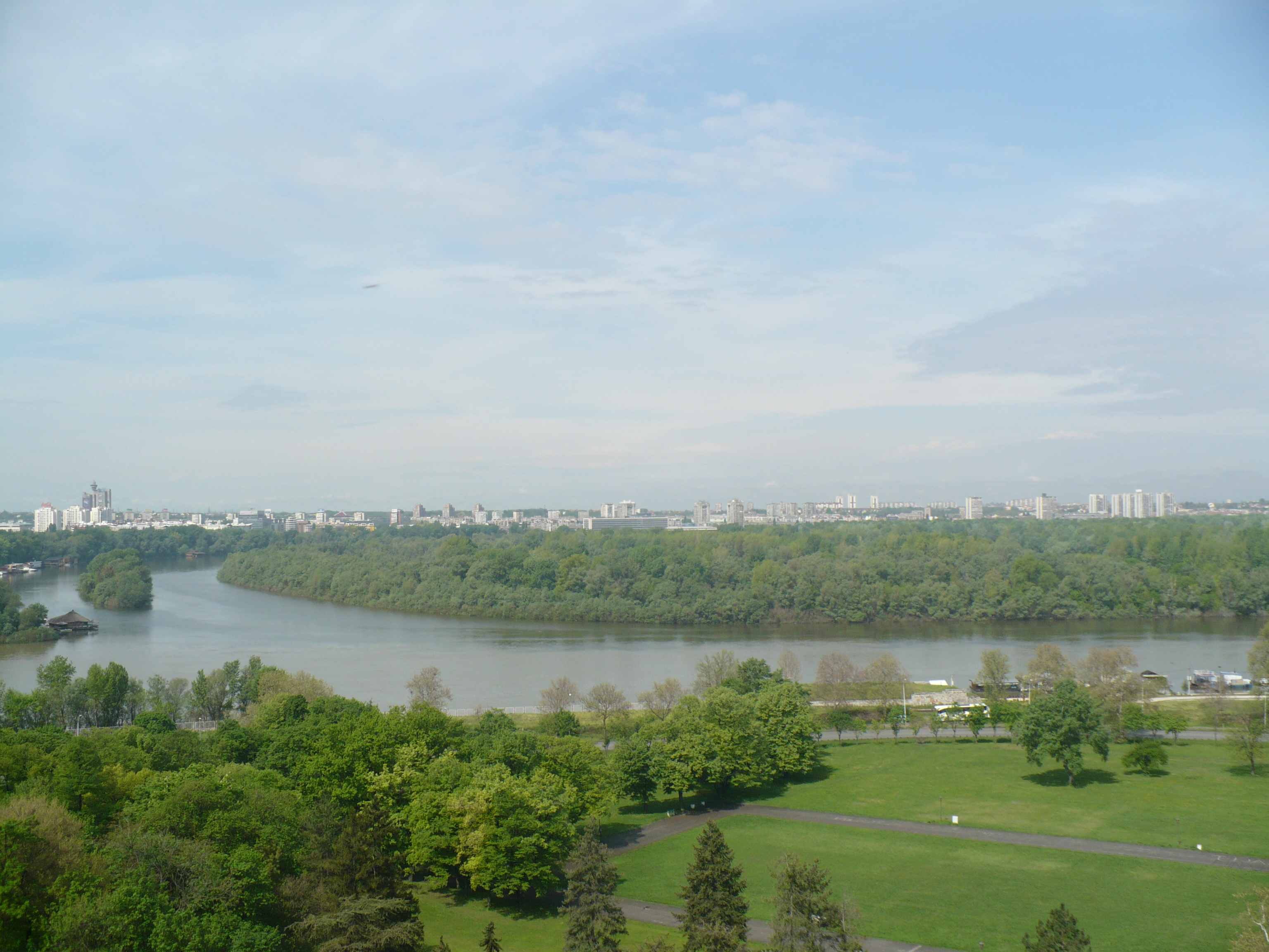 Belgrad Kalesi'nden görüntüler